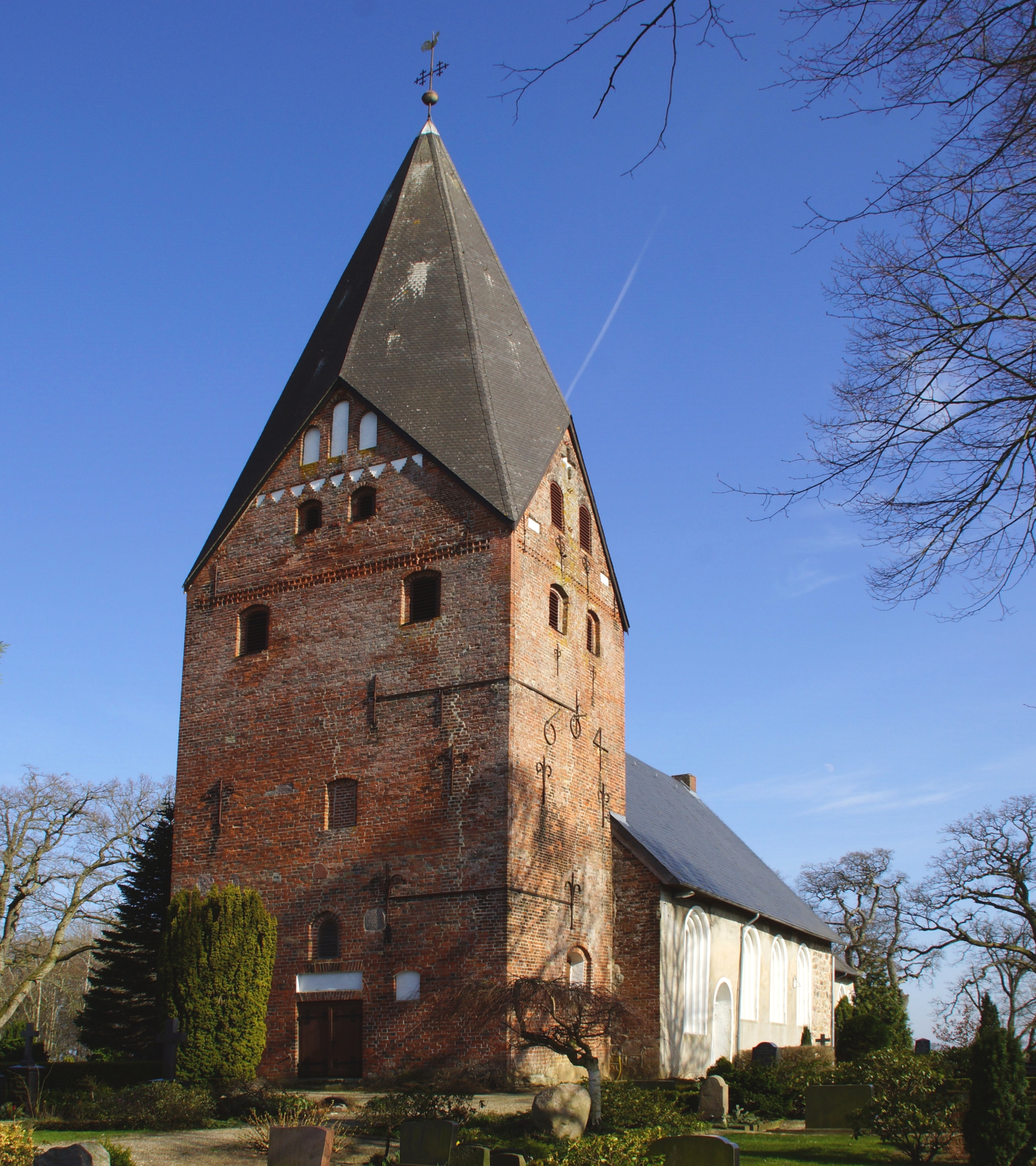 Esgrus St.-Marien-Kirche Feldsteinkirche 12. Jh mit Backsteinturm aus 15. Jh - Foto 2018 Wolfgang Pehlemann DSC01050